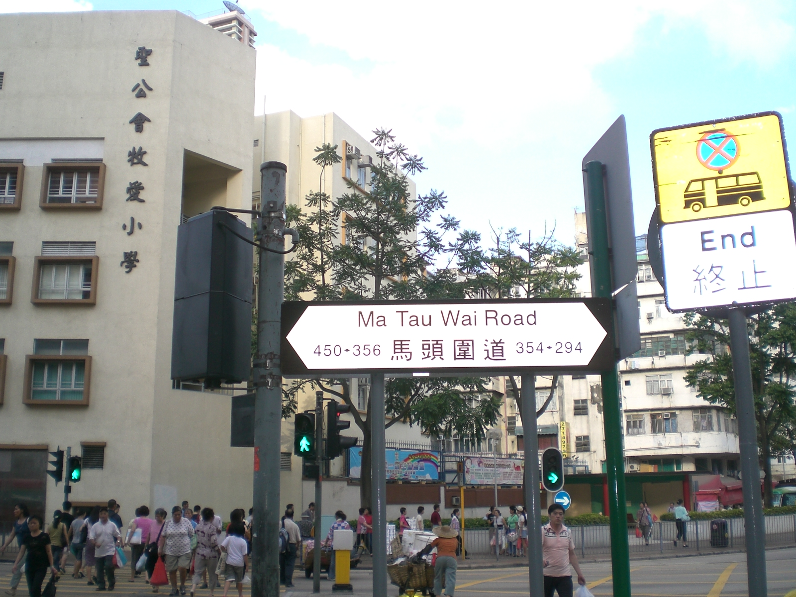 馬頭圍道356號